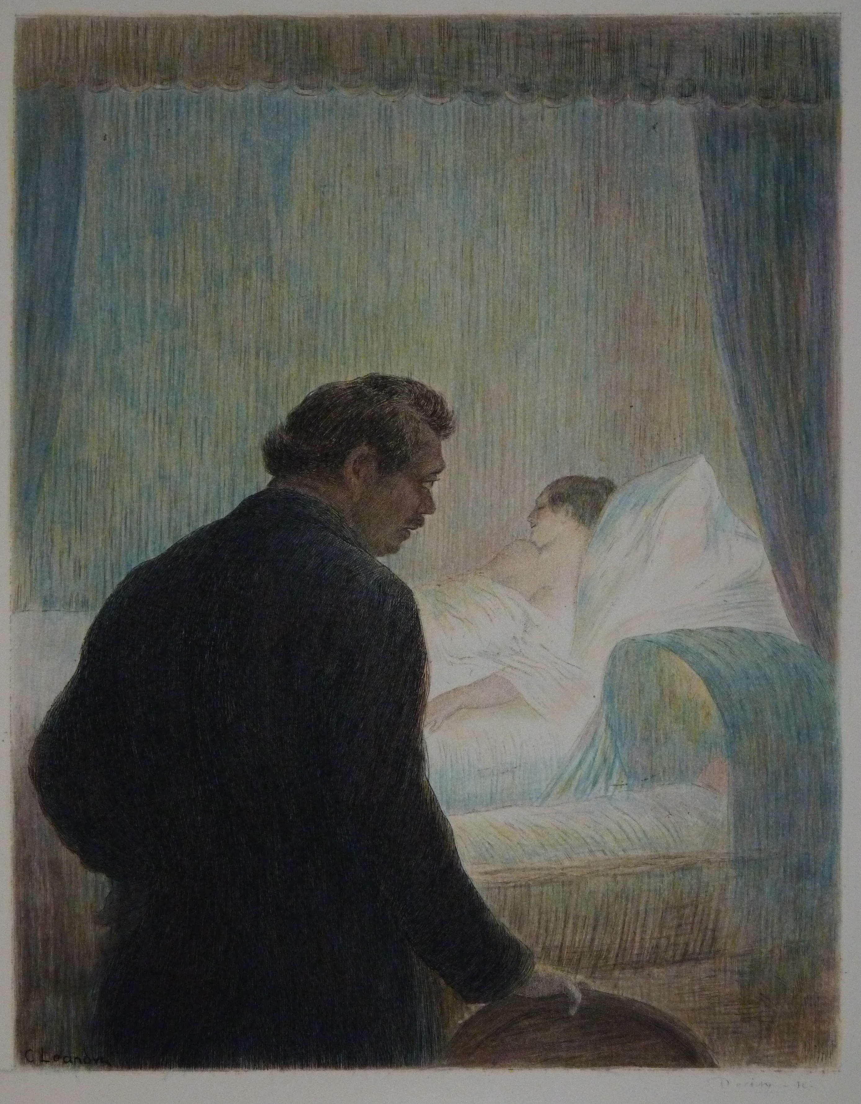 Illustration de Charles Léandre pour le livre Madame Bovary de Flaubert, gravé à l’eau-forte en couleur par Eugène Decisy. Illustration hors-texte de la page 213 : Bovary regardant sa femme et sa fille dormir.